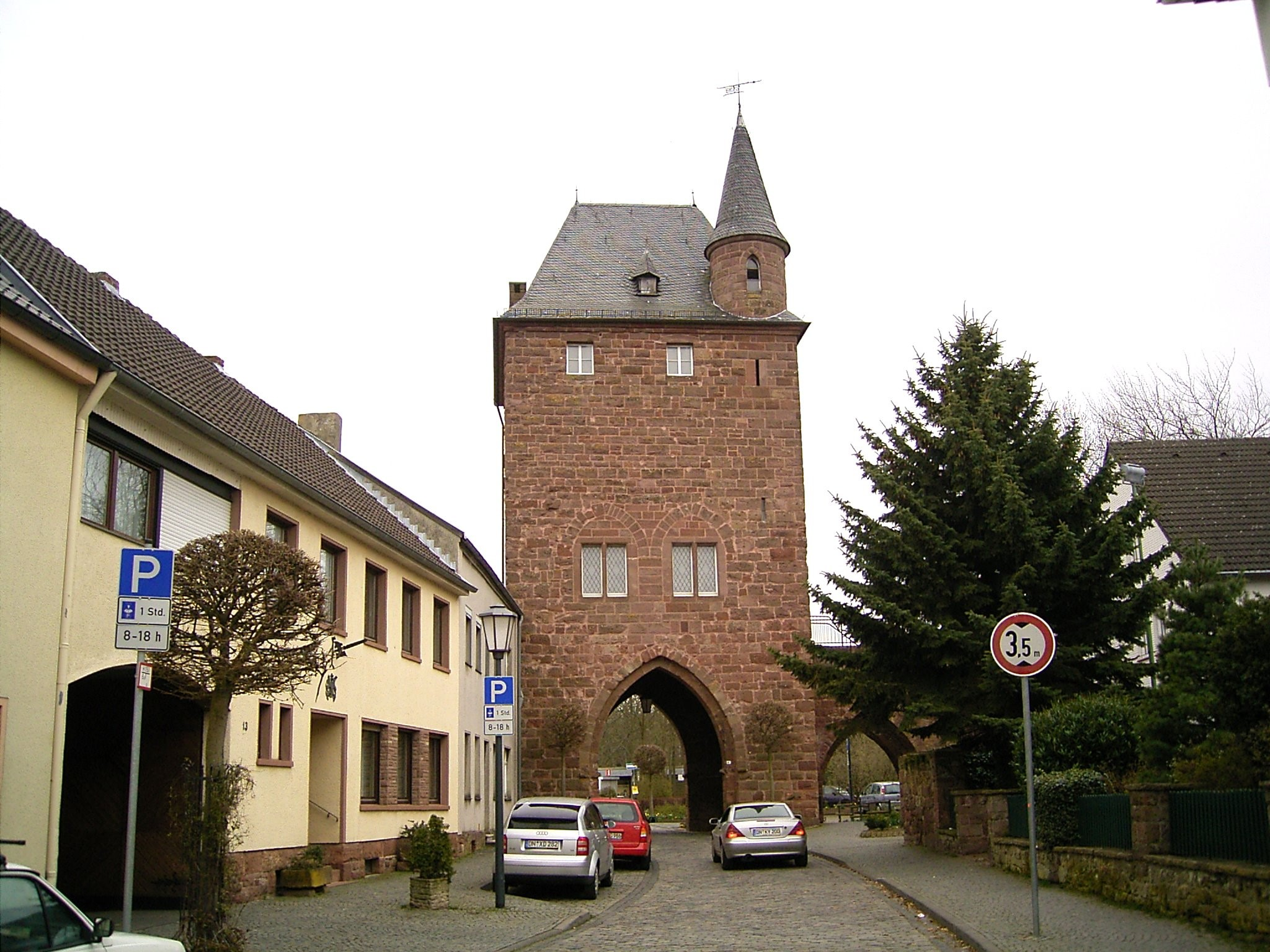 Nideggen